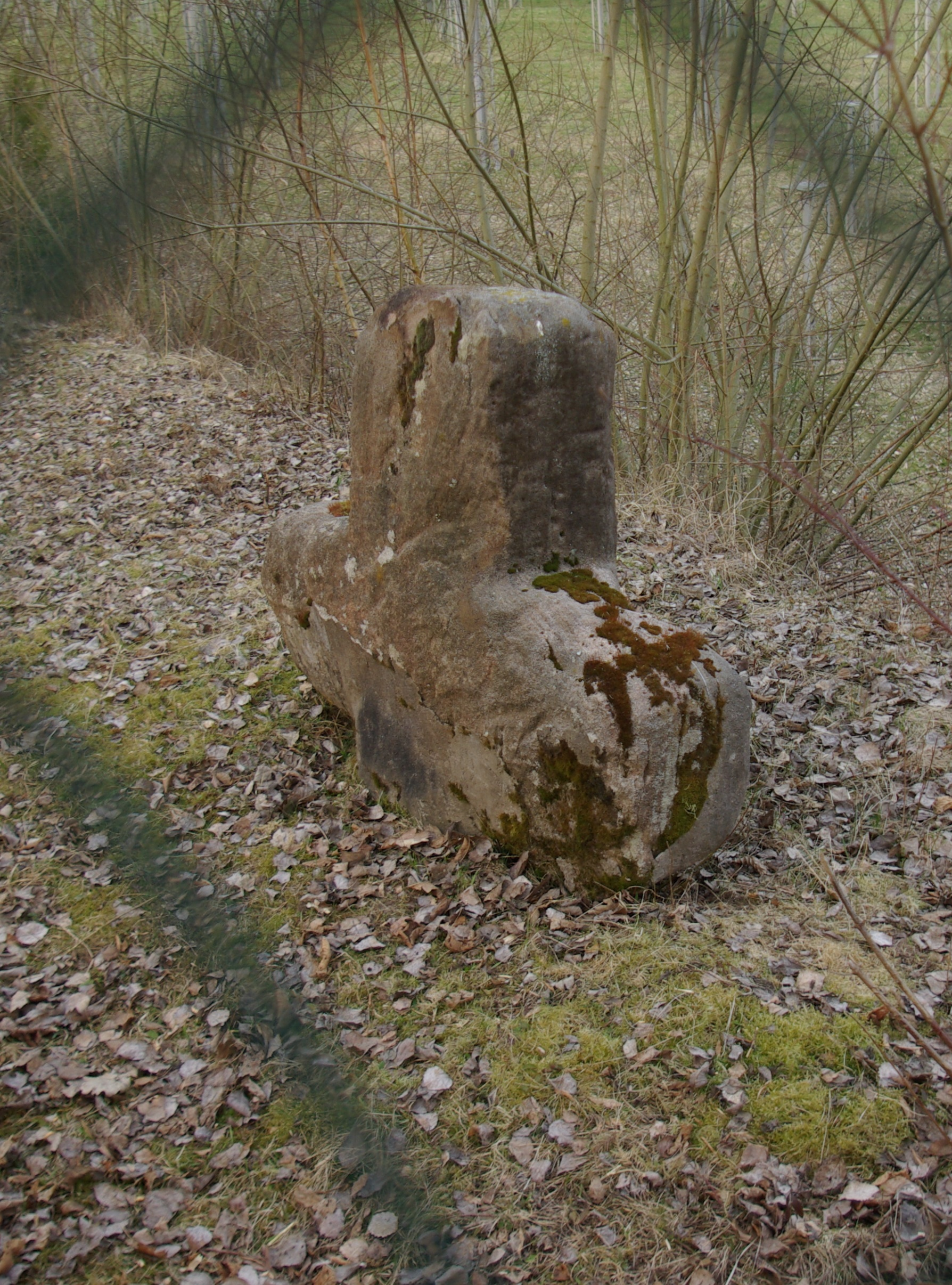 Steinkreuz bei Kriegenbrunn in der Waldabteilung beim Kreuzstein, heute Umspannwerk Kriegenbrunn, nördlich der Schleuse Kriegenbrunn